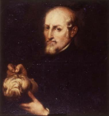 Alonso Cano, posible réplica de un autorretrato original perdido